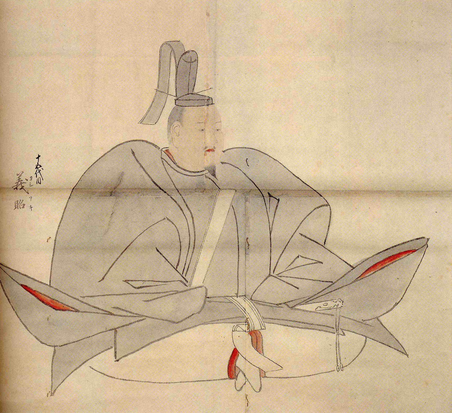 足利義昭画像